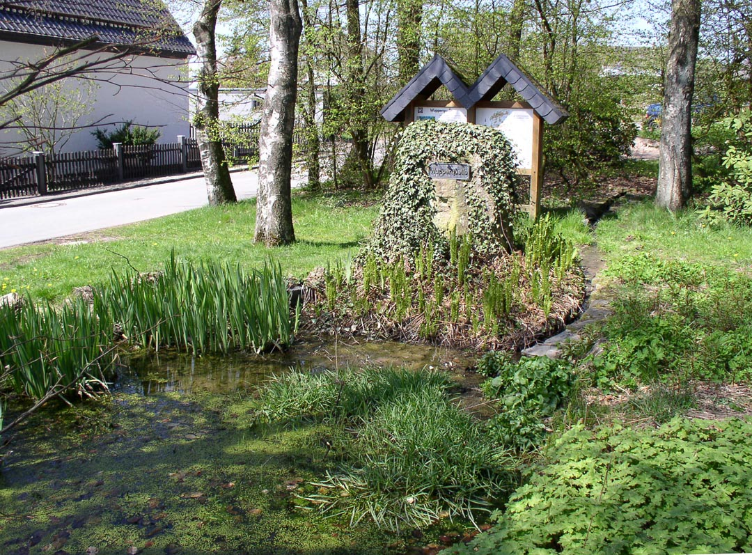 "Offizielle" Quelle der Wupper (Wipper) 2005 selbst fotografiert